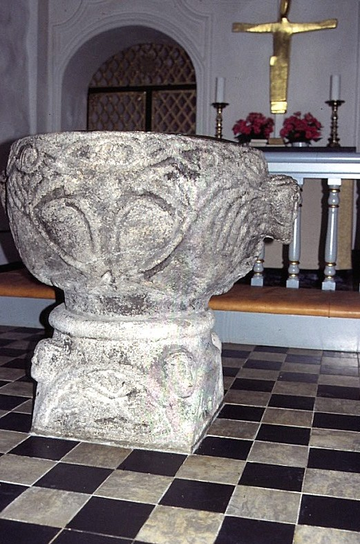 Højbjerg Kirke, døbefont